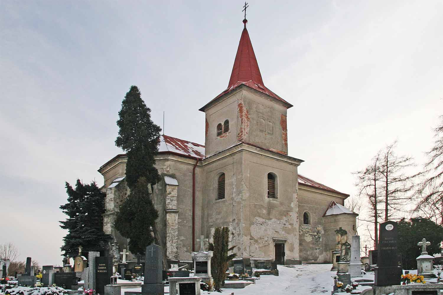 původně románský kostel Sv. Kříže u Ronova nad Doubravou